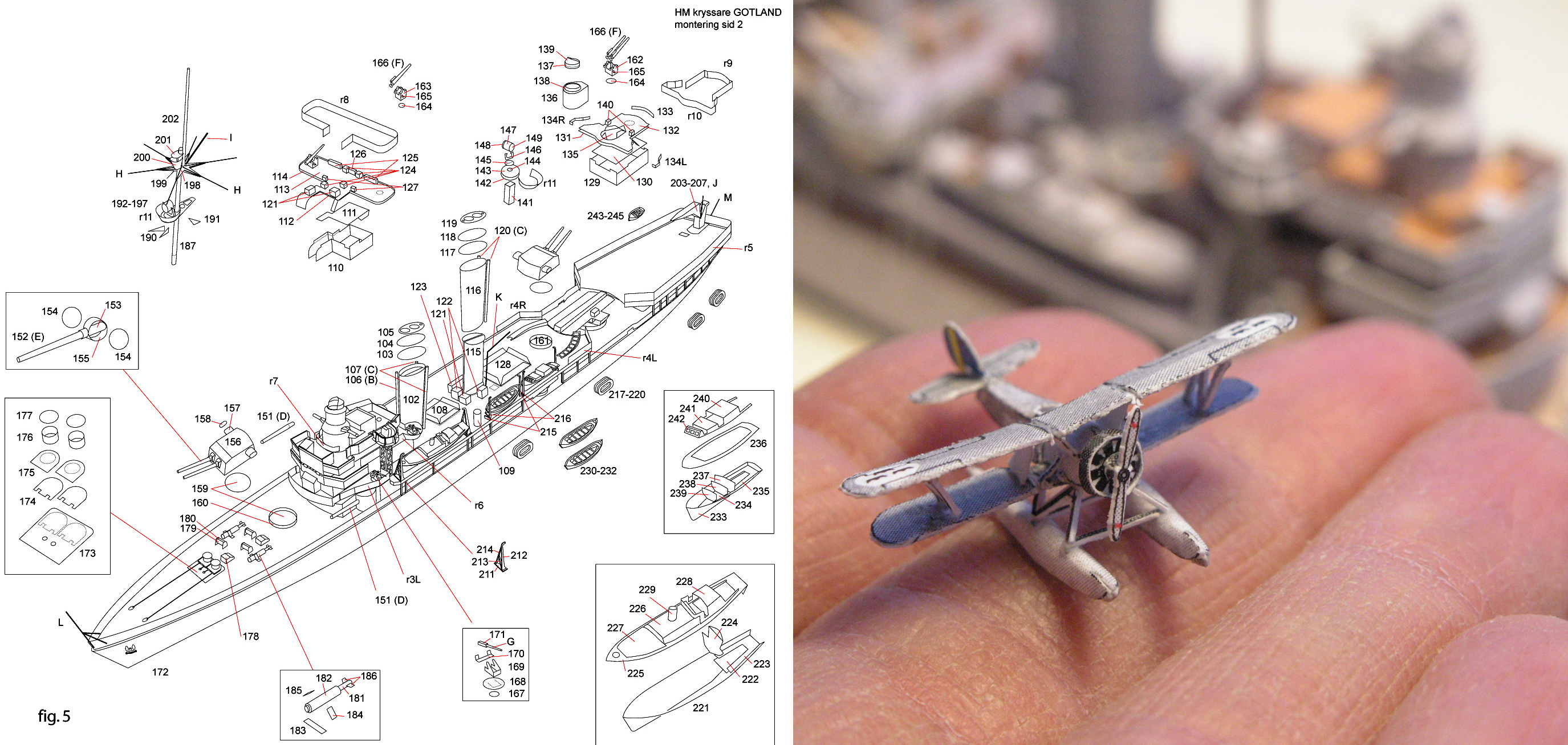 I dag krävs noggrant detaljerade klipparksmodeller. Teckningen är från bygganvisningen till en modell av flygplankryssaren Gotland i skala 1:400 och fotot visar ett av flygplanen som byggts från klipparket. Teckning, modellbygge och foto: Gunnar Sillén